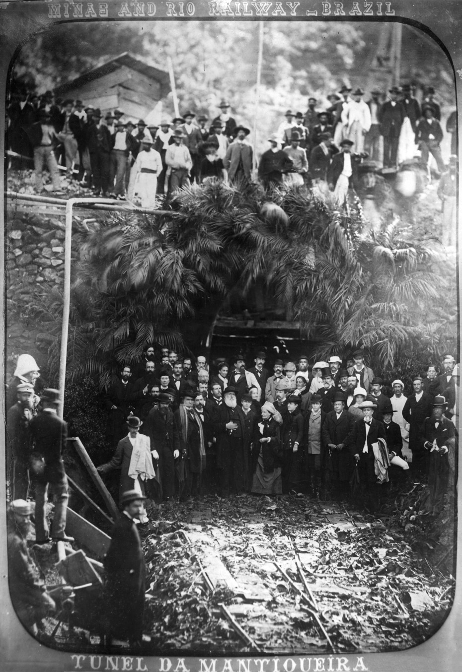 Visita do imperador Dom Pedro II e da imperatriz Tereza Cristina às obras do Túnel da Mantiqueira situado na Estrada de Ferro Minas e Rio entre os municípios brasileiros de Cruzeiro (SP) e de Passa Quatro (MG). Esta fotografia foi tirada na entrada sul do túnel, no lado do município brasileiro de Cruzeiro (SP).